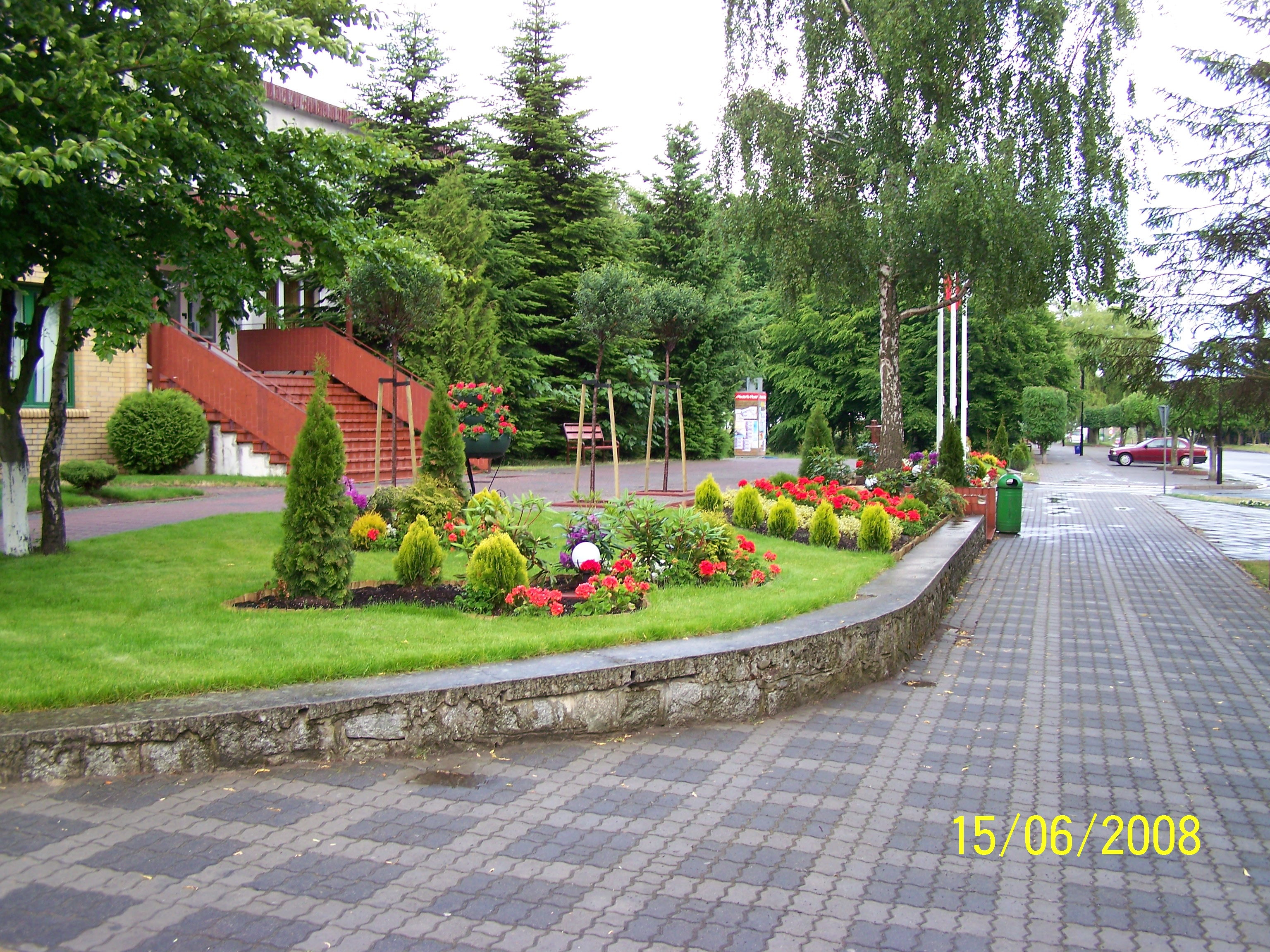 Rewal - Urząd Gminy